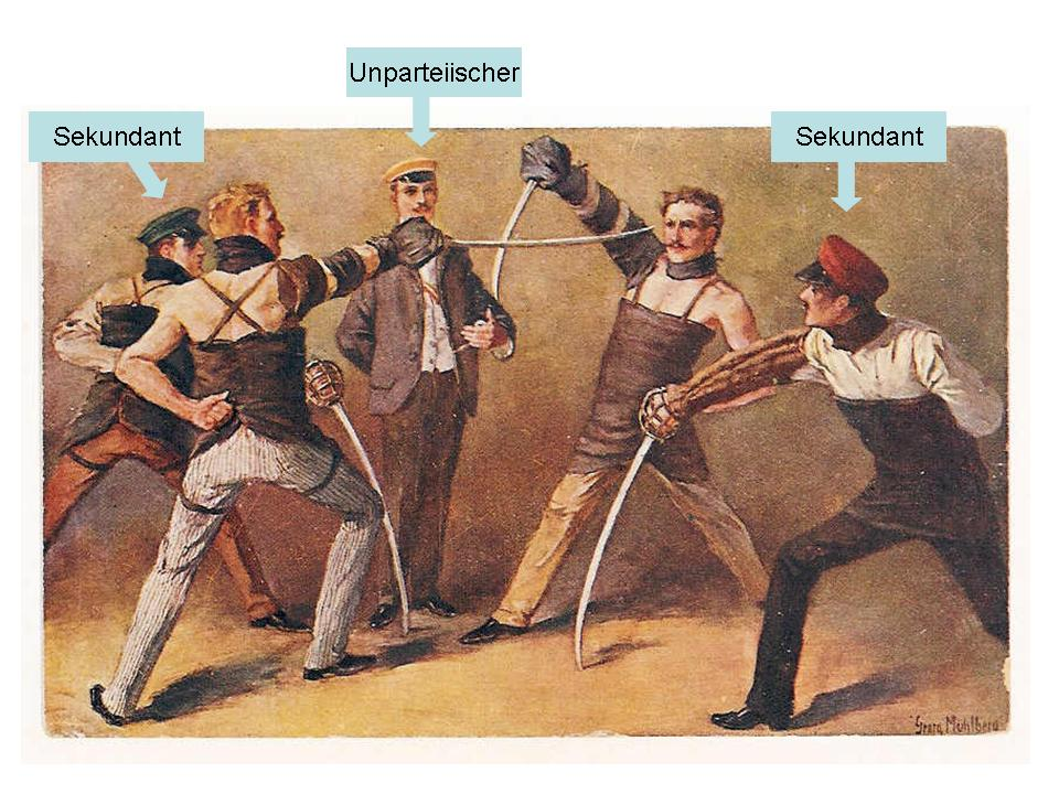 "Säbelmensur" mit Kennzeichnung der Funktionsträger